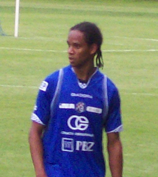 Carlos